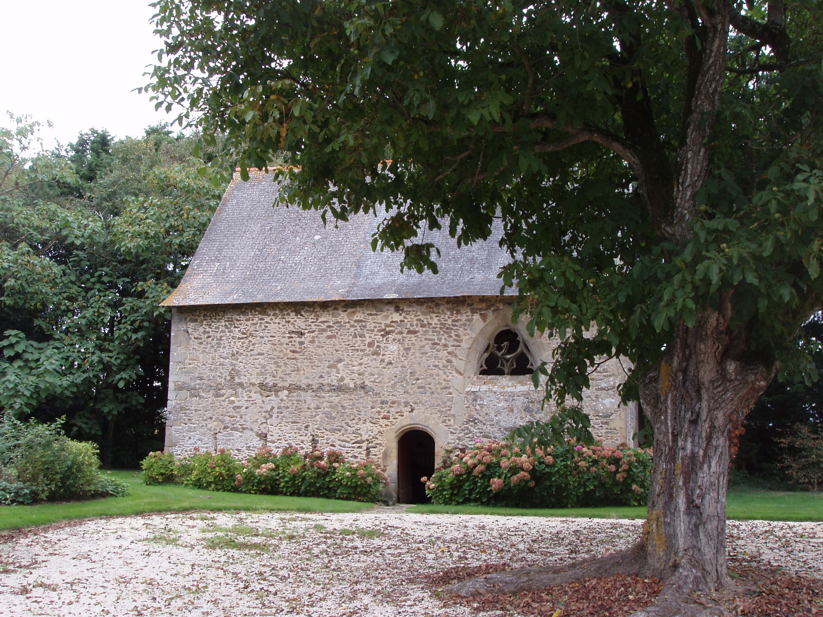 Chapelle du Pinel à Argentré-du-Plessis (Ille-et-Vilaine, France).